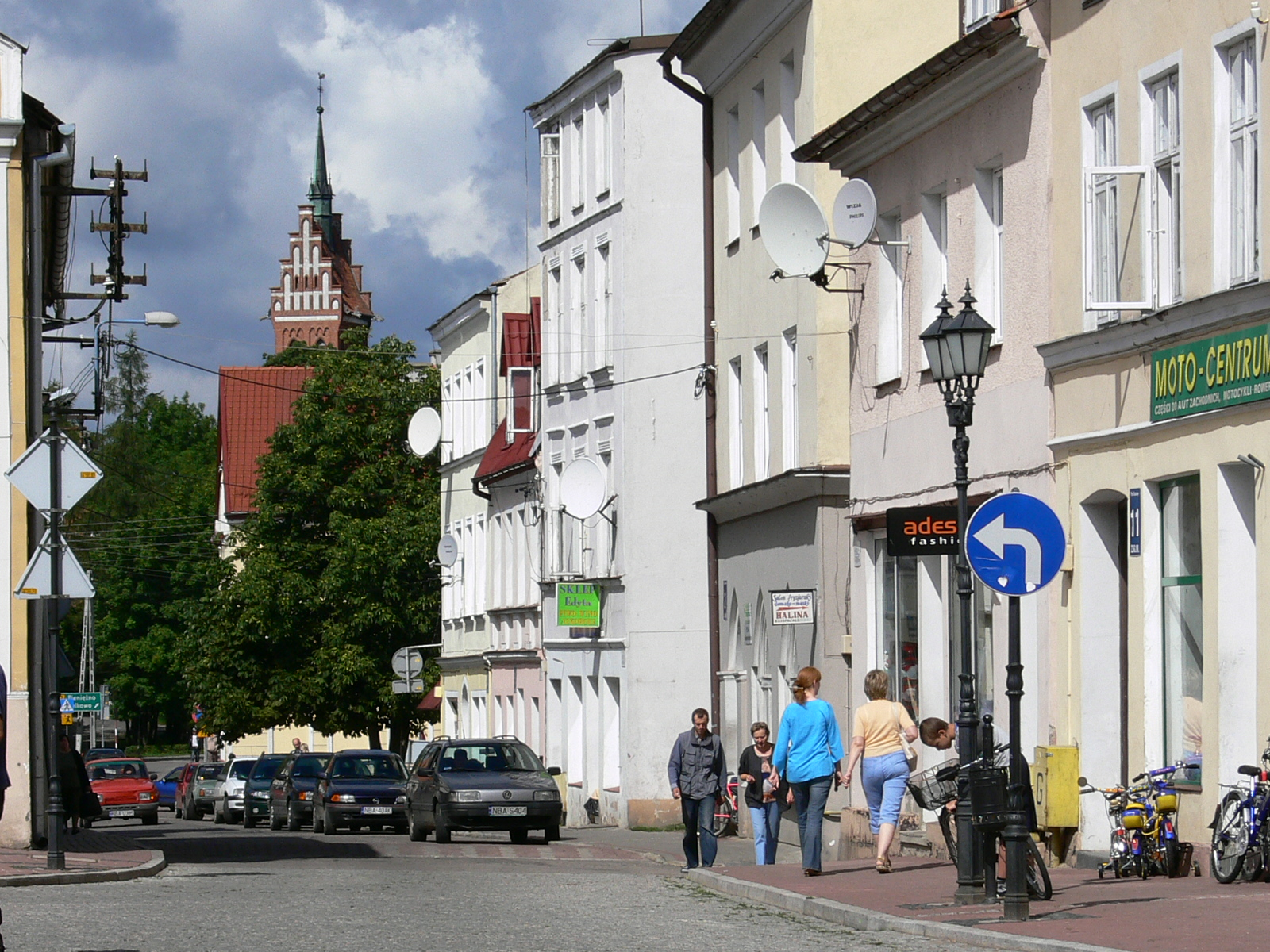 Górowo Iławeckie - fragment rynku w tle kościół katolicki pod wezwaniem św. Agaty